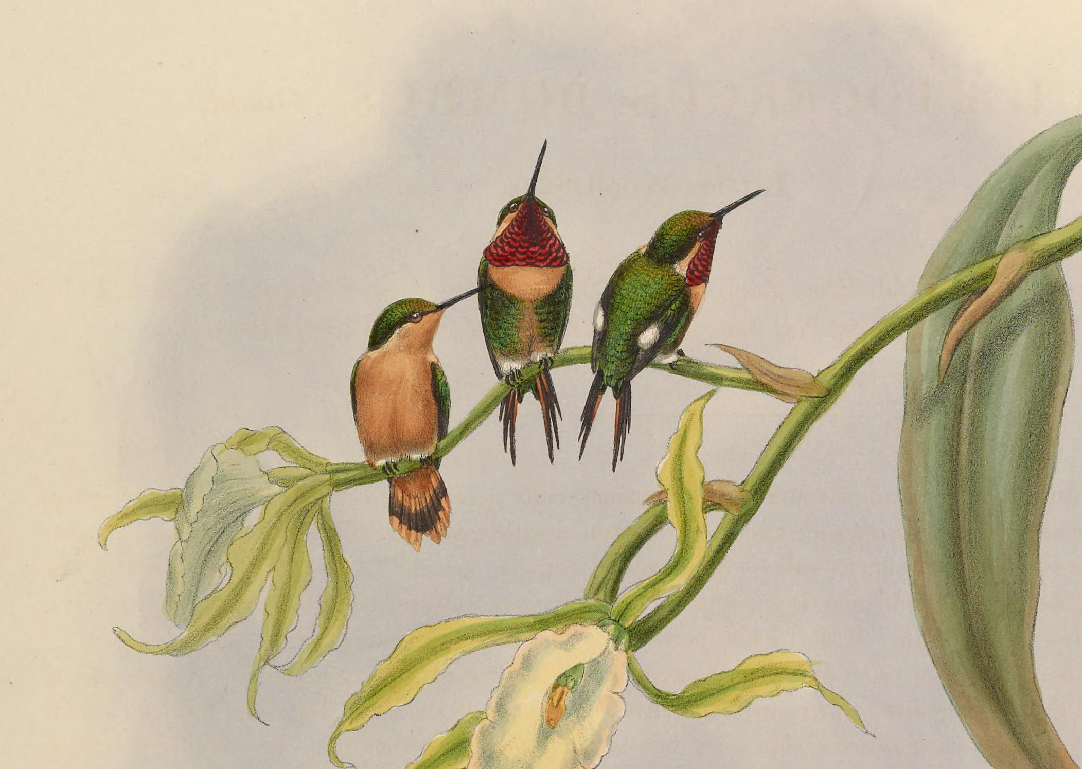 Kleine boself (Chaetocercus bombus). Detail van illustratie uit Gould, John: A monograph of the Trochilidae, or family of humming-birds (1880)